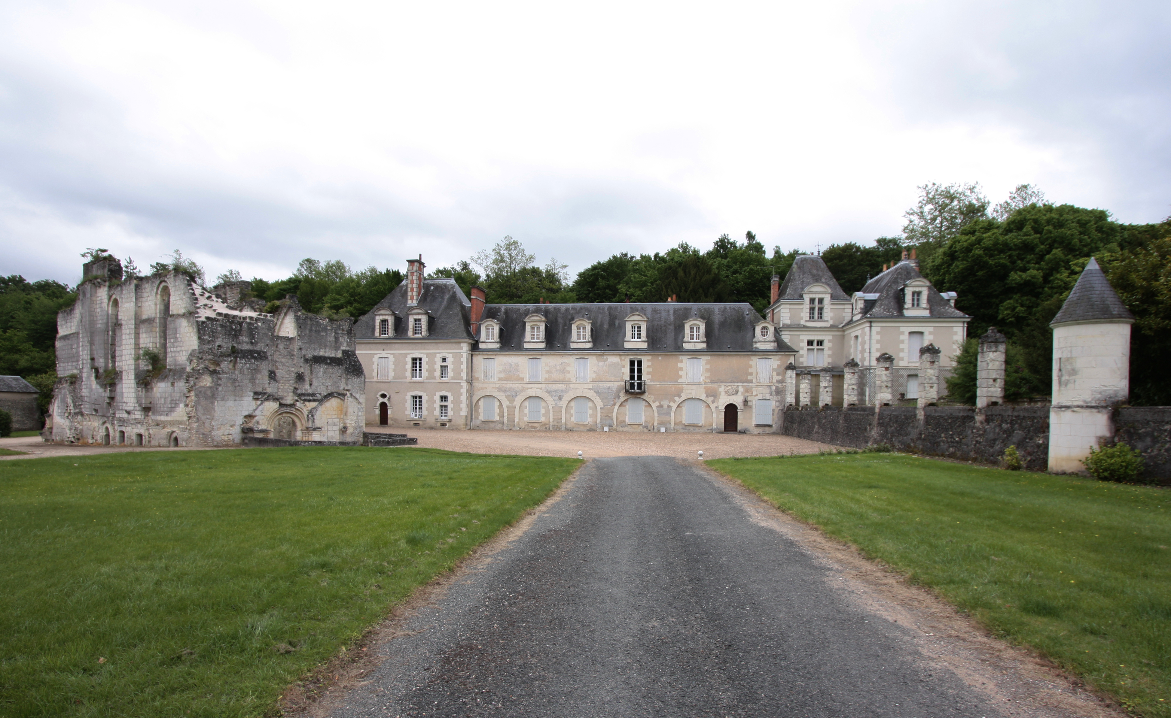 Ehemaliges Kartäuserklosters Chartreuse Saint-Jean du Liget in der französischen Gemeinde Chemillé-sur-Indrois im Département Indre-et-Loire - erhaltenes Wirtschaftsgebäude aus dem 18. Jahrhundert, davor die Ruine der Kirche aus dem 12. Jahrhundert